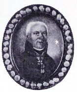 Carl Leonhard Lode